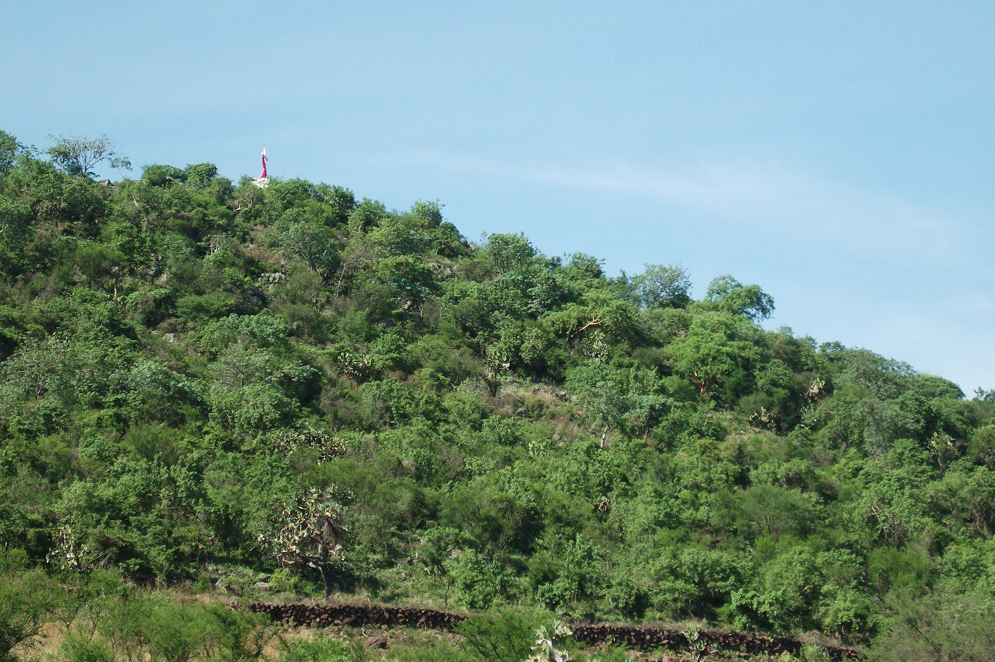 Chulada de cerro